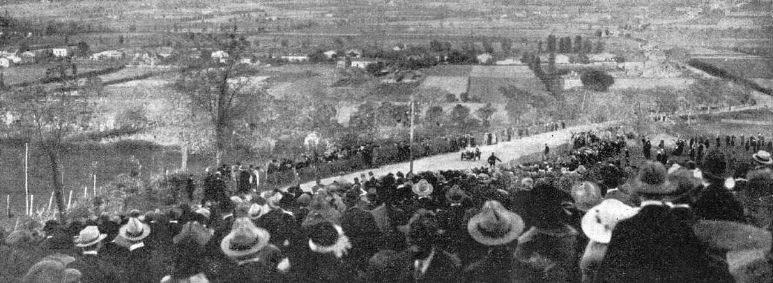 La course de côte de Griffoulet, en octobre 1922 (Toulouse - vainqueur Jules Goux, sur Ballot 2L.).